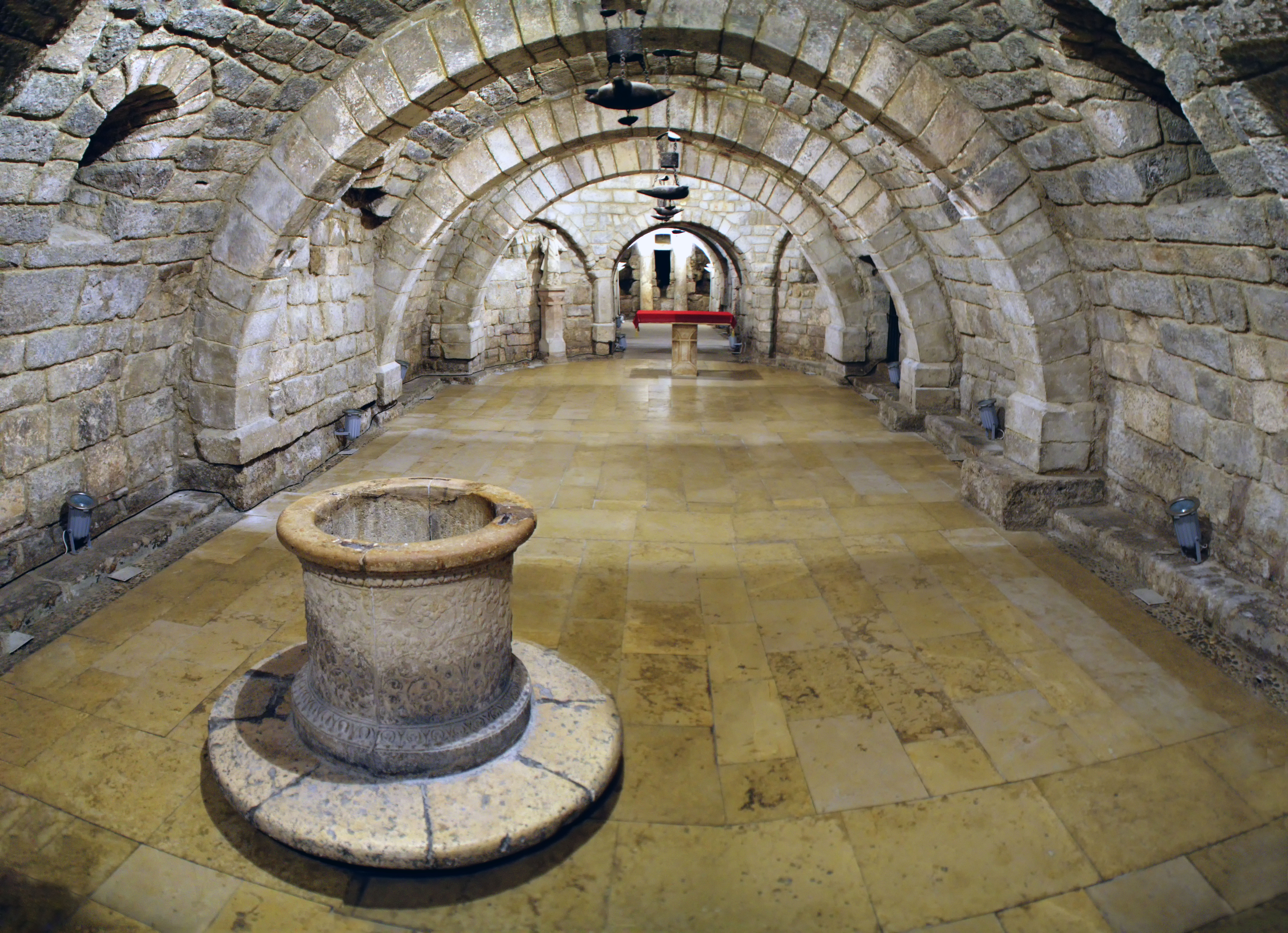 Esta cripta está bajo el coro de la catedral de Palencia, España. Es un vestigio de una iglesia visigoda del siglo VII con elementos posteriores del siglo XI. La foto es una panorámica parcial hecha a partir de 5 fotografías.